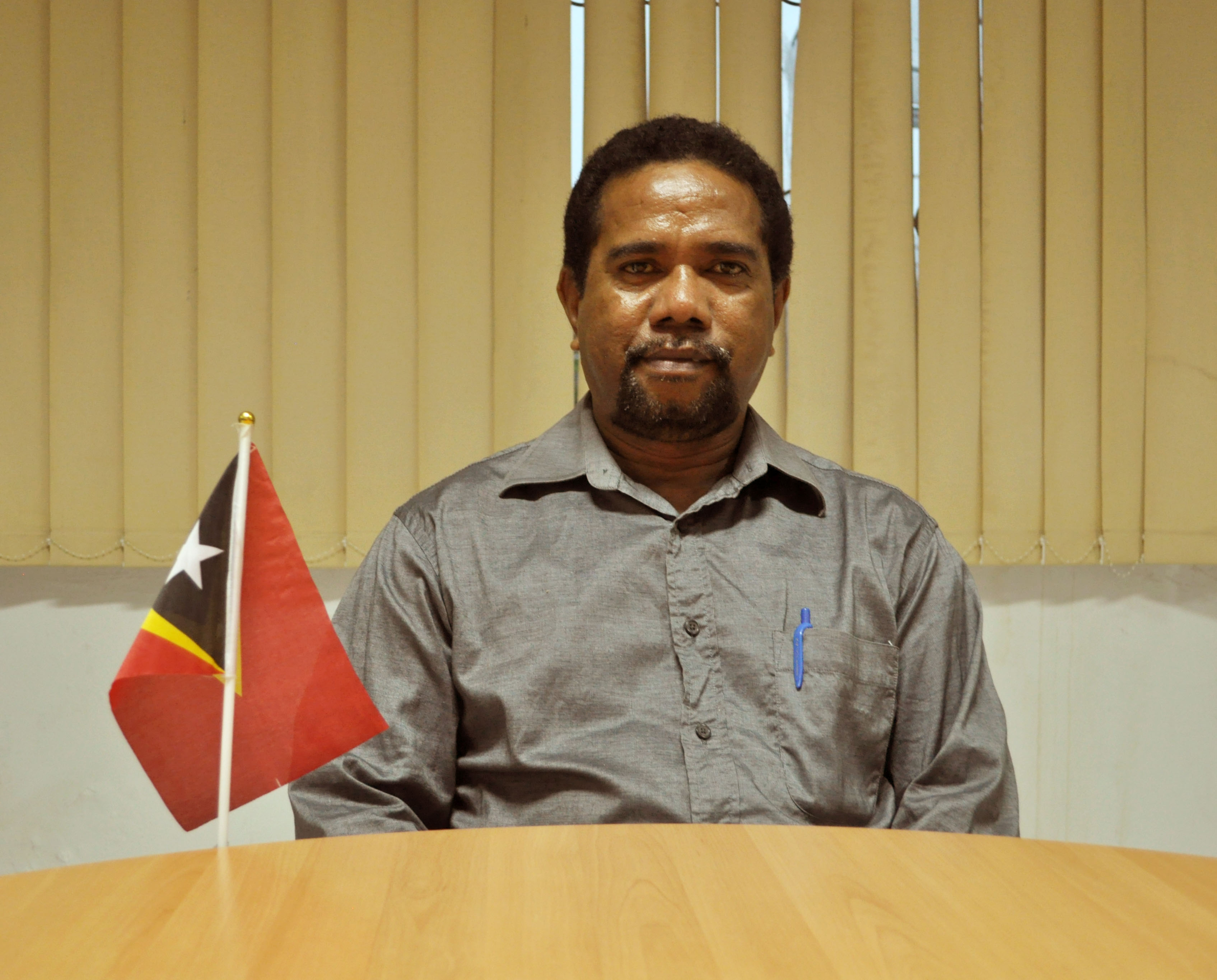 José Filipe Ximenes Smith, Administrator des Subdistrikts Cristo Rei